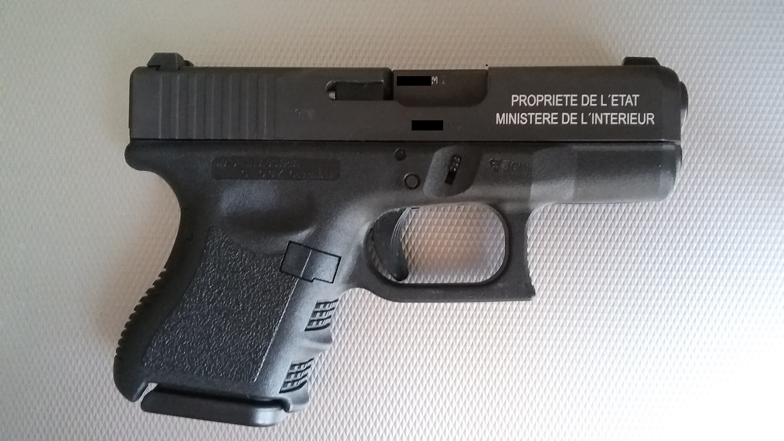 Glock 26 Gendarmerie (modèle pour SR et BR)